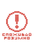 Логотип социальной инициативы "Споживай Розумно"